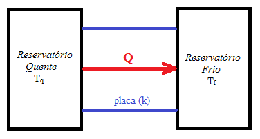 Calor